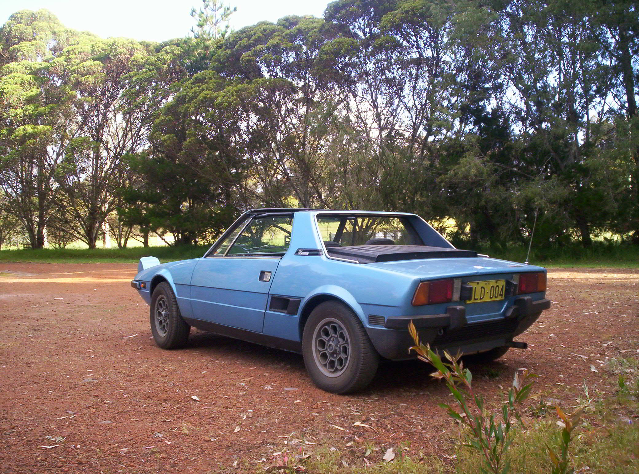 =Fiat X19 1978